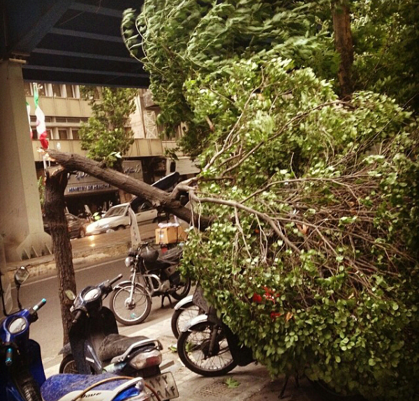 طوفان تهران پل حافظ